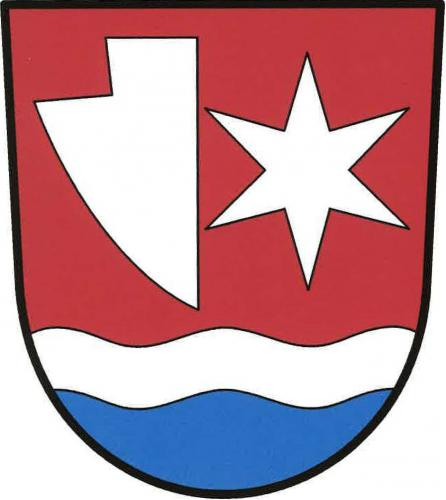 znak, Vidonín, okres Žďár nad Sázavou